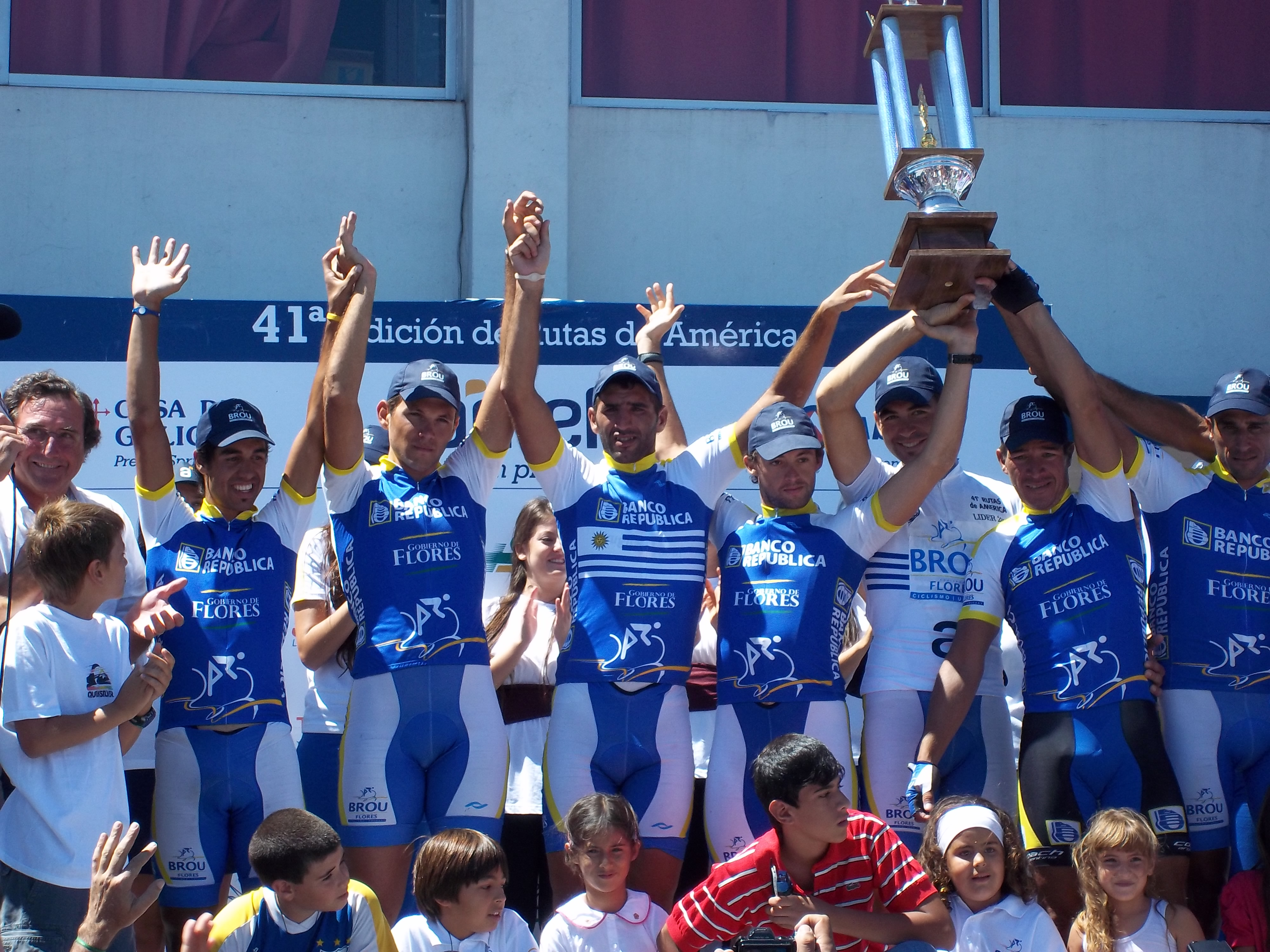 Equipo ciclista BROU-Flores, ganador de Rutas de América 2012